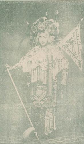 West-Vlams: 题名： 青衣尚小云 文献来源： 《寸心》 出版时间： 1917 年 卷期(页)： [ 第3期 ，1页 ] 中图分类号： I216